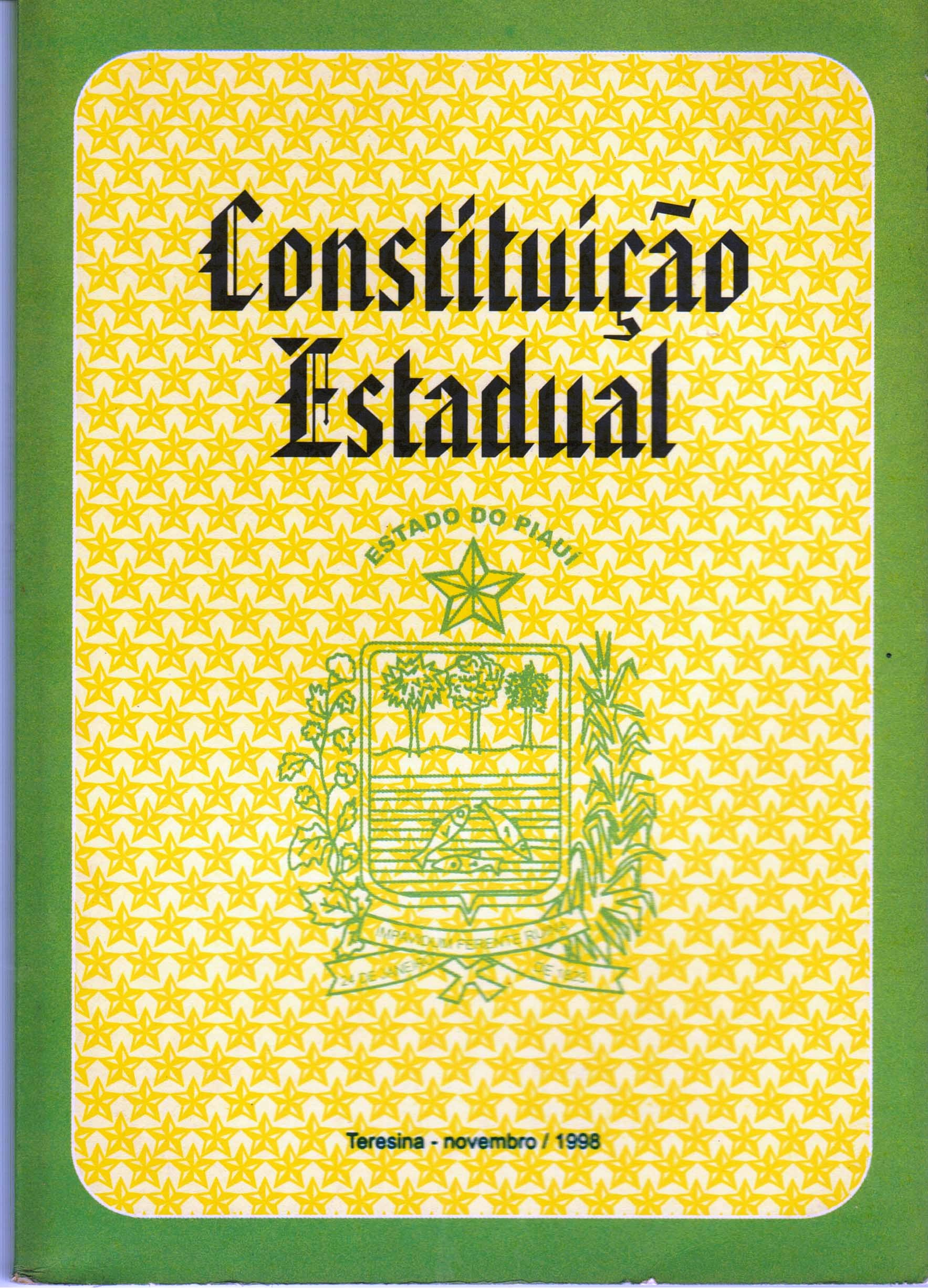 Constitição do Estado do Piauí impressa em 1998 com as emendas de 1 a 6.